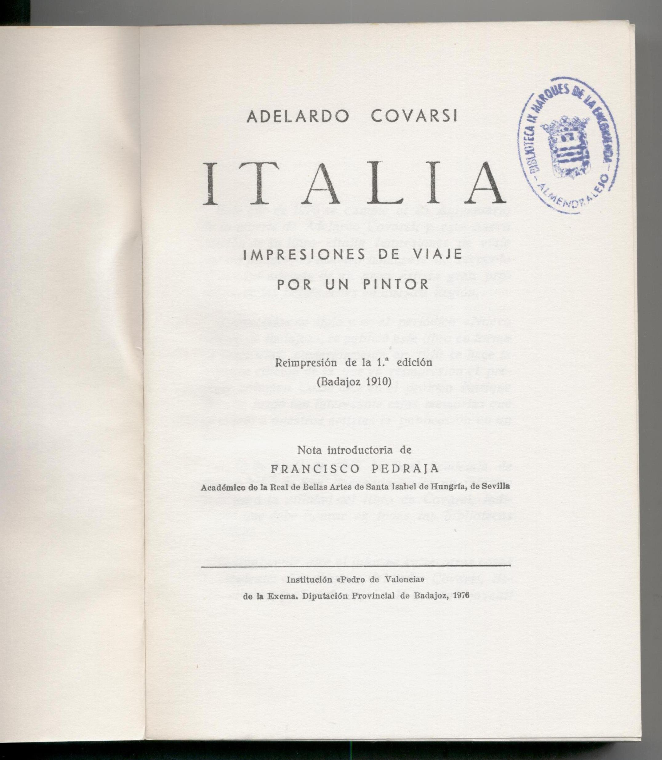 Adelardo Covarsí. Italia – Impresiones de viaje por un pintor. 1976. Reimpresión de la primera edición (Badajoz, 1910). Imagen de portada. Adelardo Covarsí (1885–1951) Alternative names Adelardo Covarsí Yustas; Adelardo CovarsíDescriptionSpanish painter, art educator and art historianDate of birth/death 24 April 1885 26 August 1951Location of birth/death Badajoz BadajozAuthority control : Q5657519 VIAF: 74776162 ISNI: 0000 0000 6639 7793 ULAN: 500035867 GND: 124094333 BNF: 145721672 creator QS:P170,Q5657519